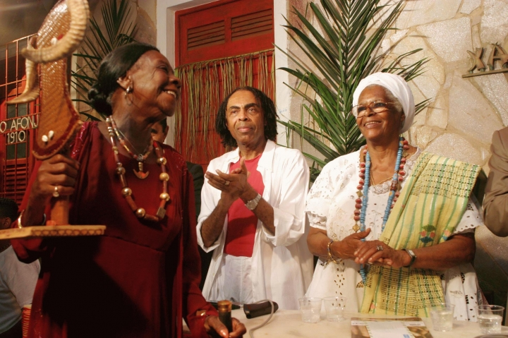 Mãe Olga do Alaketu, Ministro da Cultura Gilberto Gil e Mãe Stella de Oxóssi em Salvador, Bahia